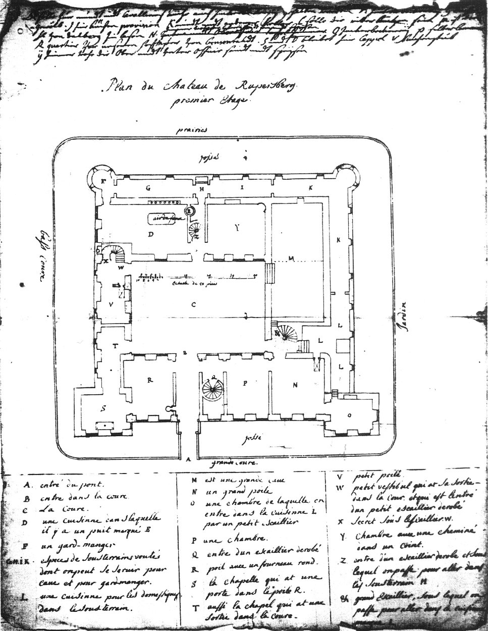 Grundriss von Schloss Ruppertsberg mit Umnutzungsüberlegungen Damian Hugo von Schönborns